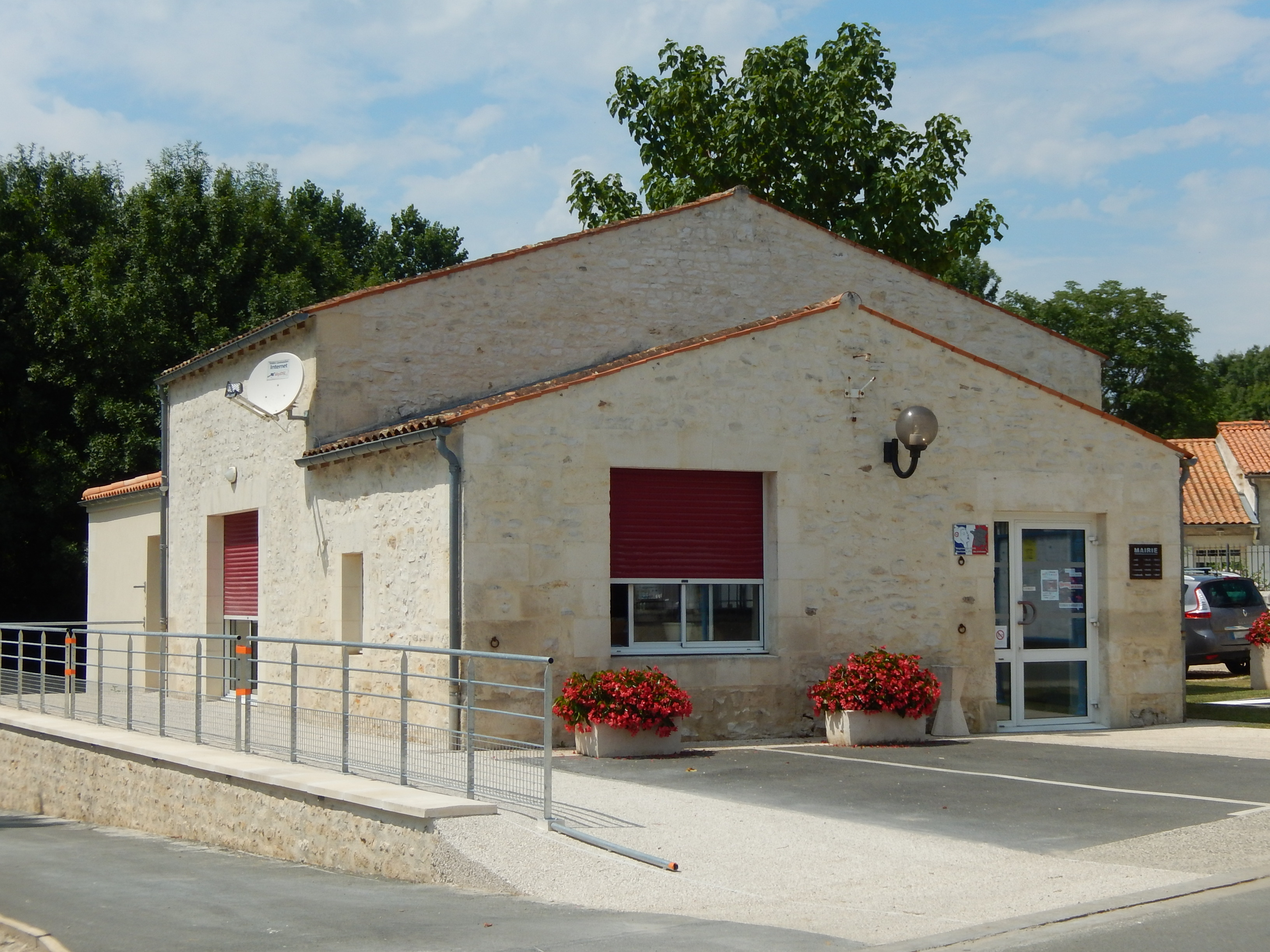 La mairie de la commune française de Varzay, en Charente-Maritime.